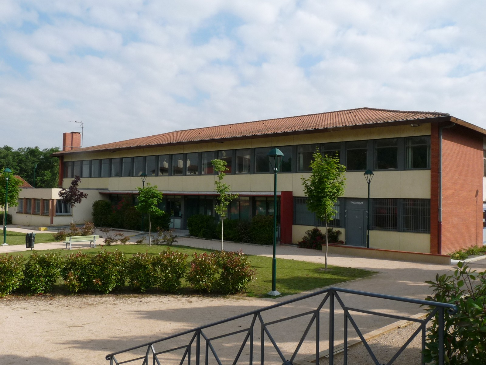 Salle des fêtes, Escalquens, Haute-Garonne, France